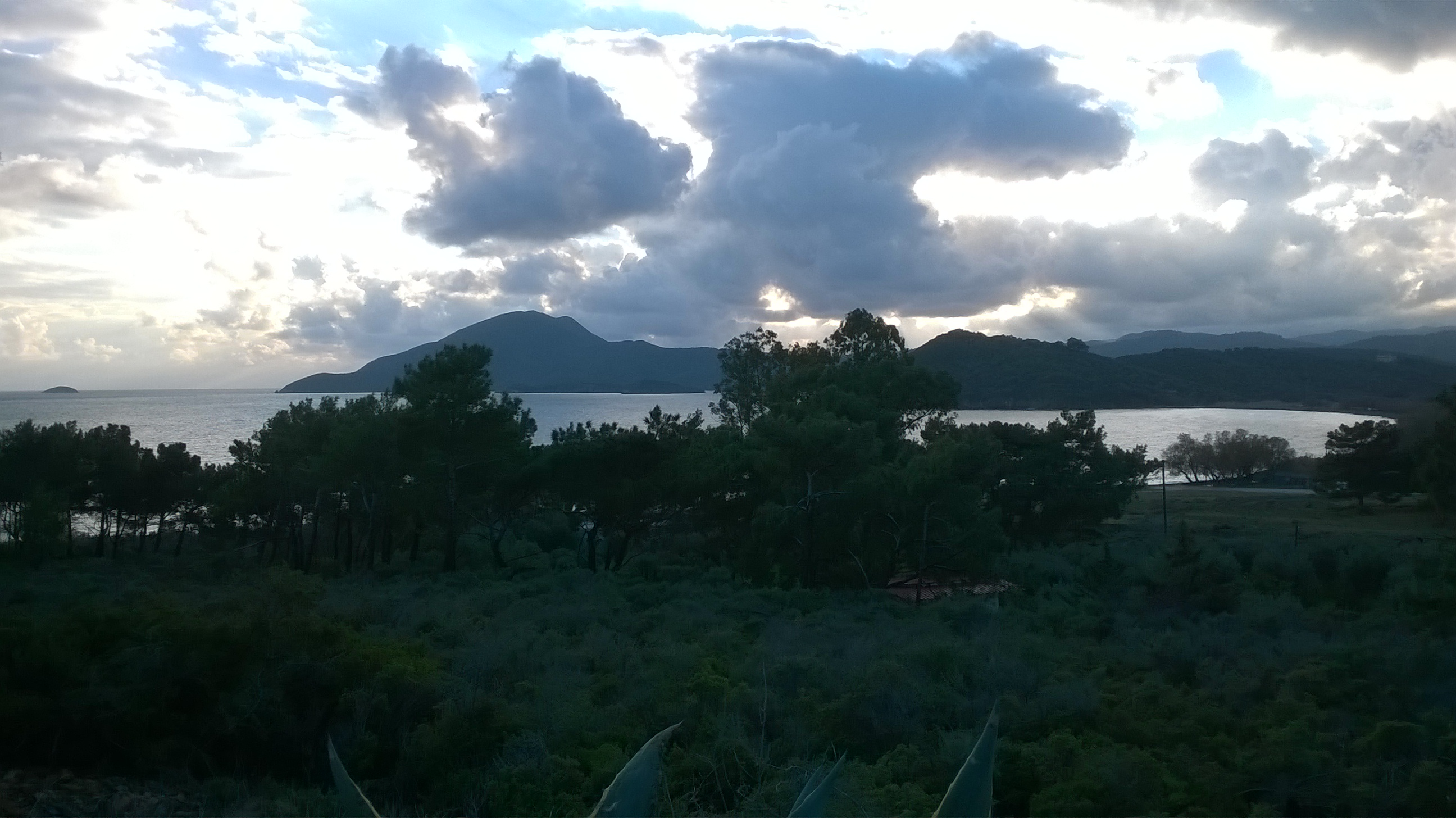 Μια όμορφη απογευματινή άποψη του κόλπου της Χαραμίδας μετά από βροχή. This is a photography of Natura 2000 protected area with ID GR4110005